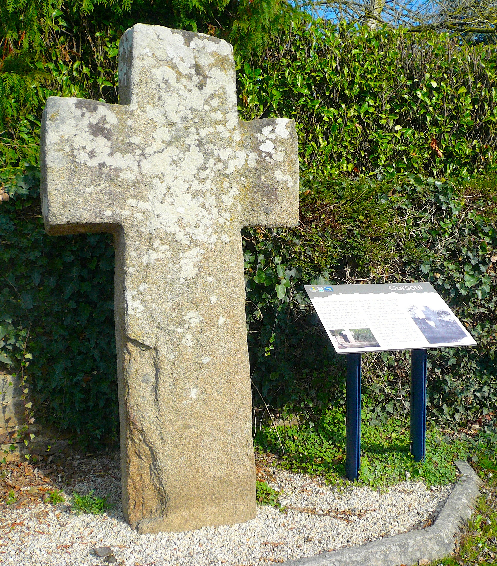 Croix romane du XIe siècle, située rue de Montafilan à Corseul dans les Côtes d'Armor.